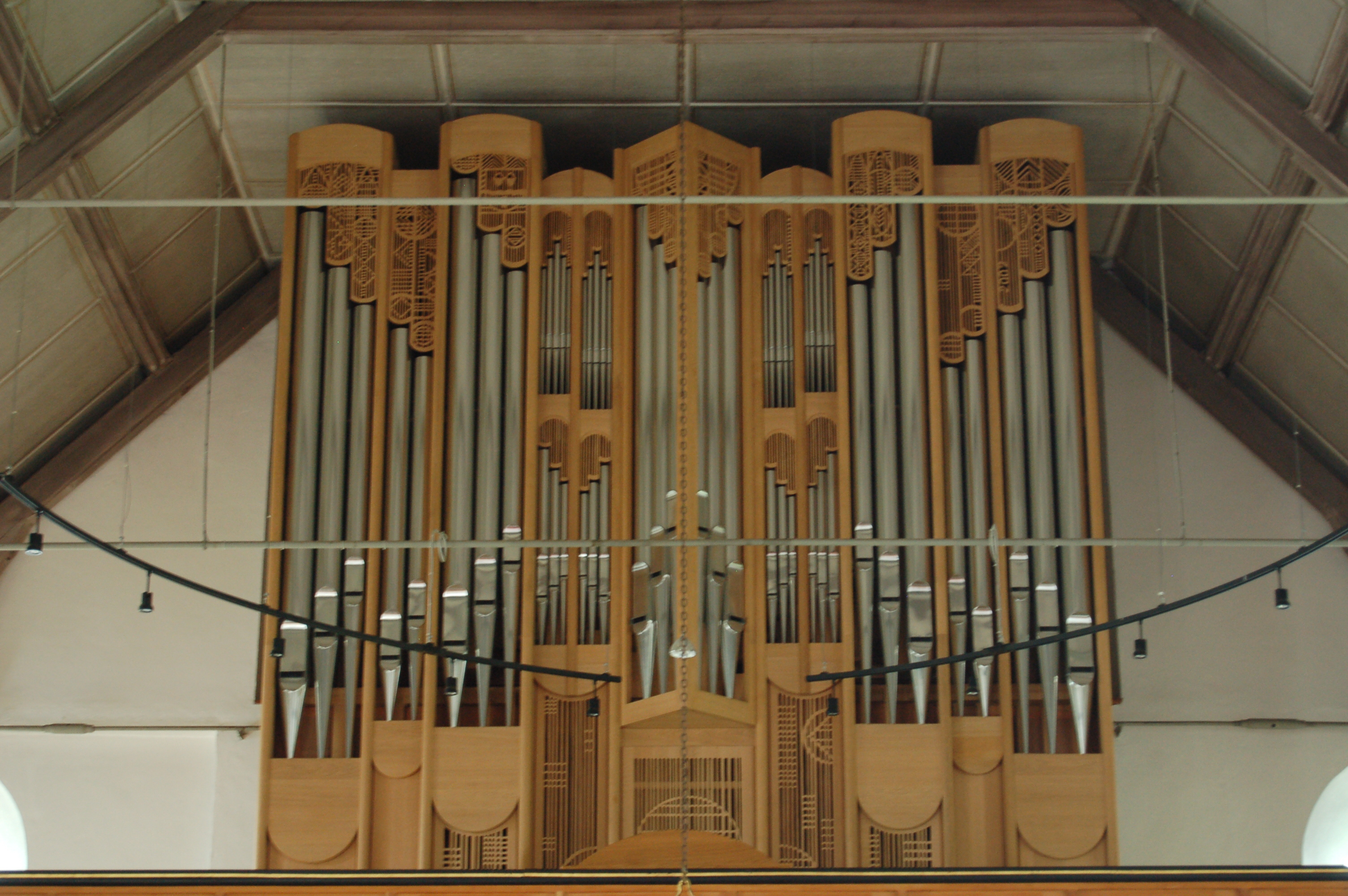 Die Lobback-Orgel der Hl. Dreikönigskirche in Haselau, Dies Orgel wurde 2002 von G. Christian Lobback erbaut. Sie besitzt zwanzig klingende Register und hat Eintausendzweihundertvierundfünfzig Pfeifen.